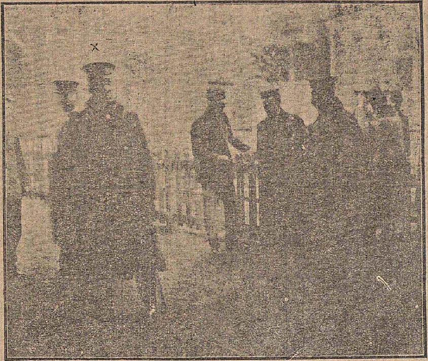 류혁로 충청북도 장관 임지부임 출발 사진, 남대문역 앞에서 촬영